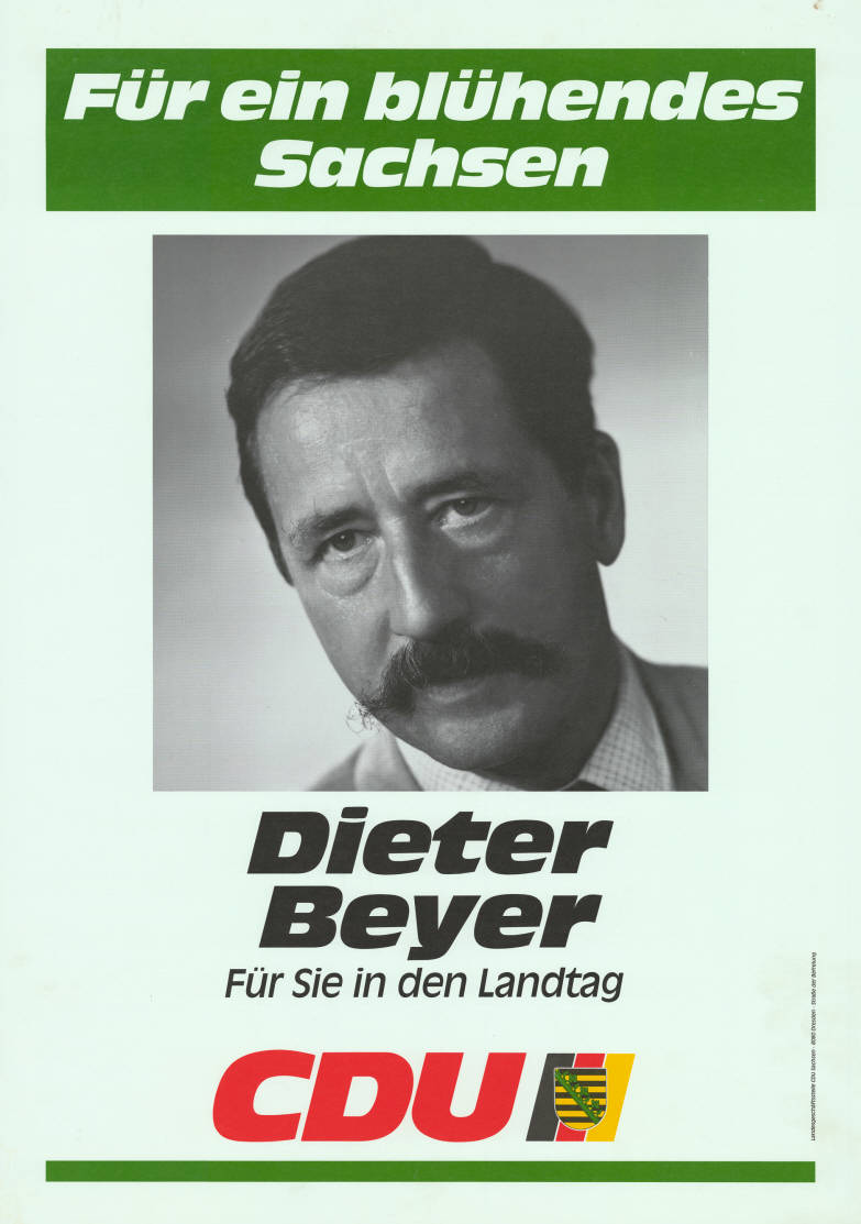 Für ein blühendes Sachsen Dieter Beyer Für Sie in den Landtag CDUAbbildung:PorträtfotoPlakatart:Kandidaten-/Personenplakat mit PorträtAuftraggeber:Landesgeschäftsstelle CDU Sachsen, DresdenObjekt-Signatur:10-035 : 2Bestand:Landtagswahlplakate Sachsen (10-035)GliederungBestand10-18:Landtagswahlplakate Sachsen (10-035) » CDULizenz:KAS/ACDP 10-035 : 2 CC-BY-SA 3.0 DE